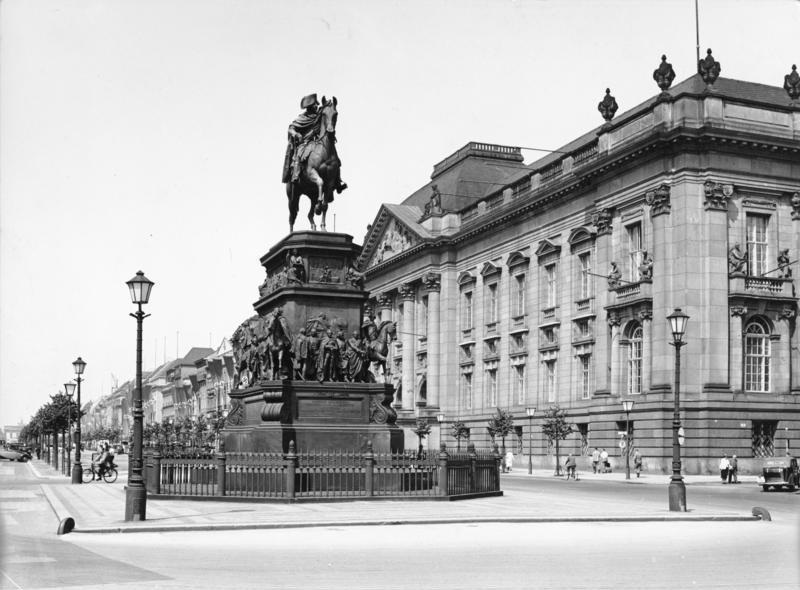 Berlin; Staatsbibliothek, Unter den Linden und Denkmal Friedrich des Großen nach 1935